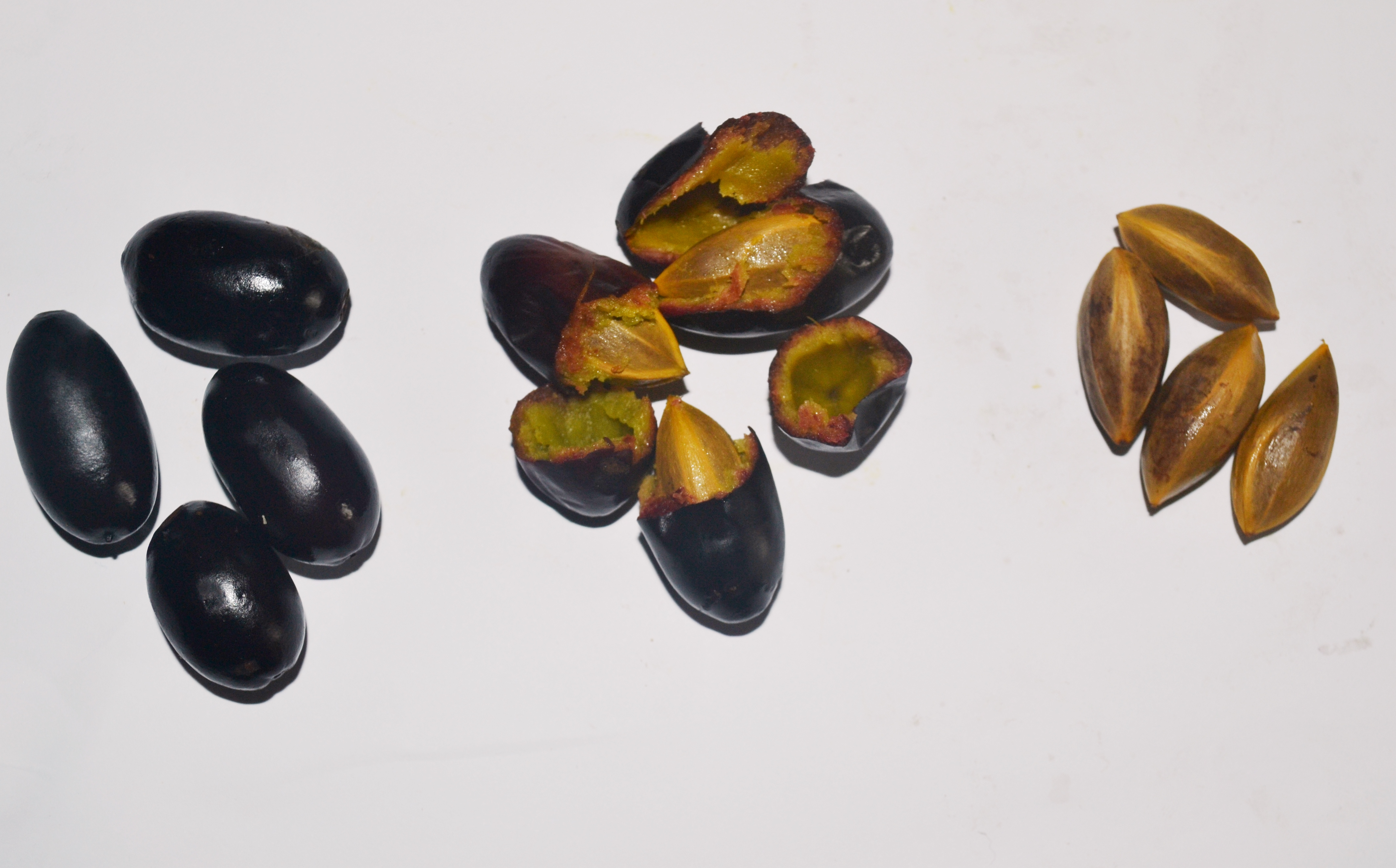 Fruit, pulpe et noyau Canarium schweinfurthii cuit communément appelé fruits noirs au Cameroun et African elemi ou canarium dans certains pays africains